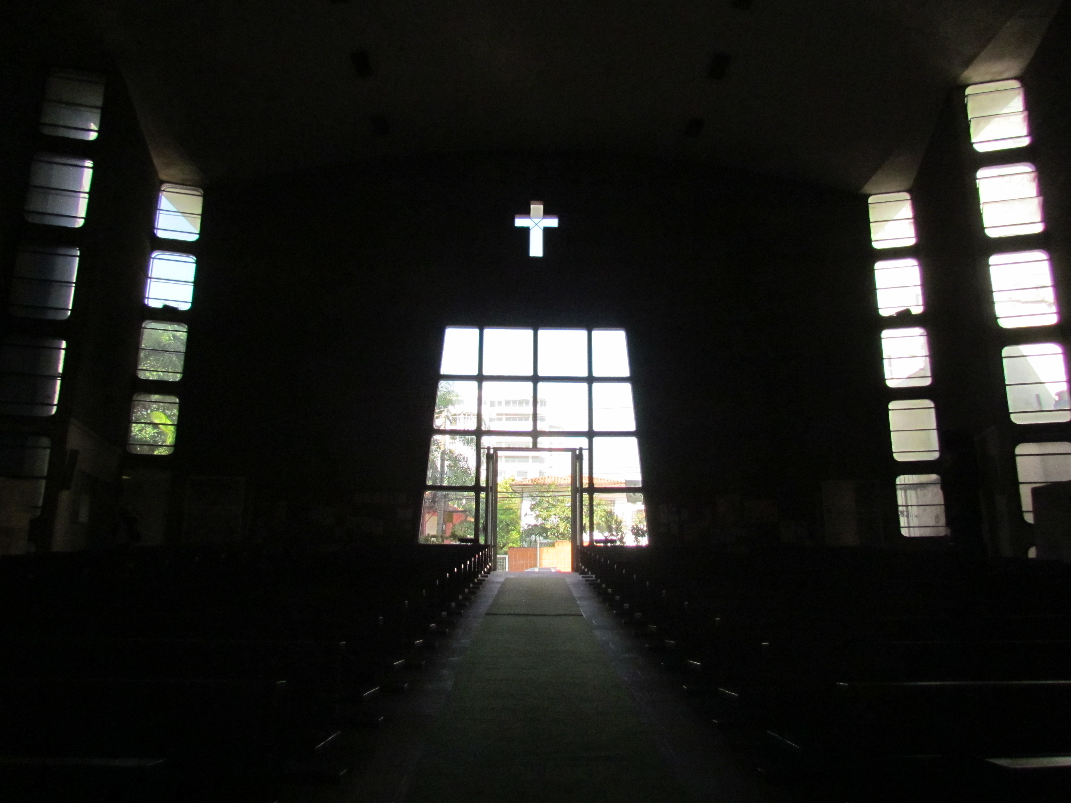 Entrada da Igreja de São Domingos, em São Paulo (SP), Brasil.